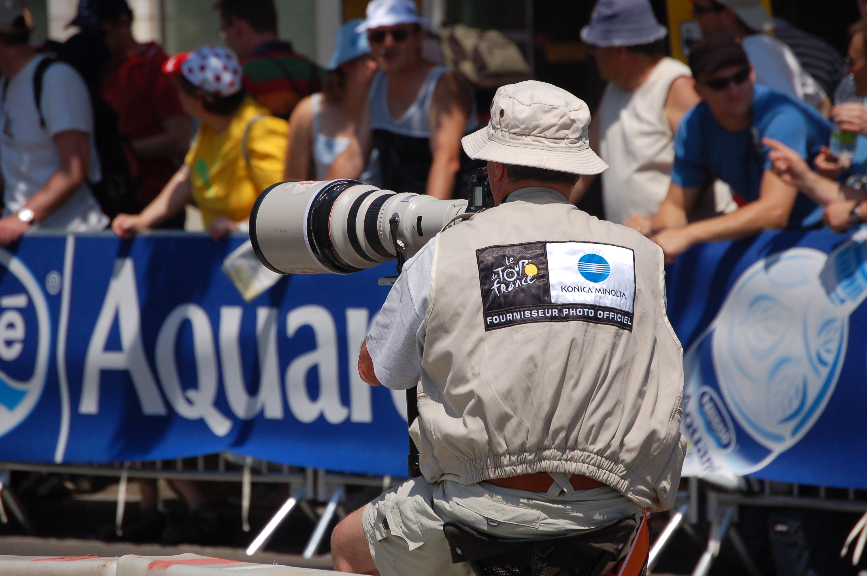 Sportfotograf bei der Tour de France 2006